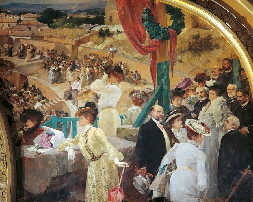 Fresque peinte par Albert Maignan situé au restaurant parisien Le Train Bleu dans le hall de la gare de Paris-Lyon.